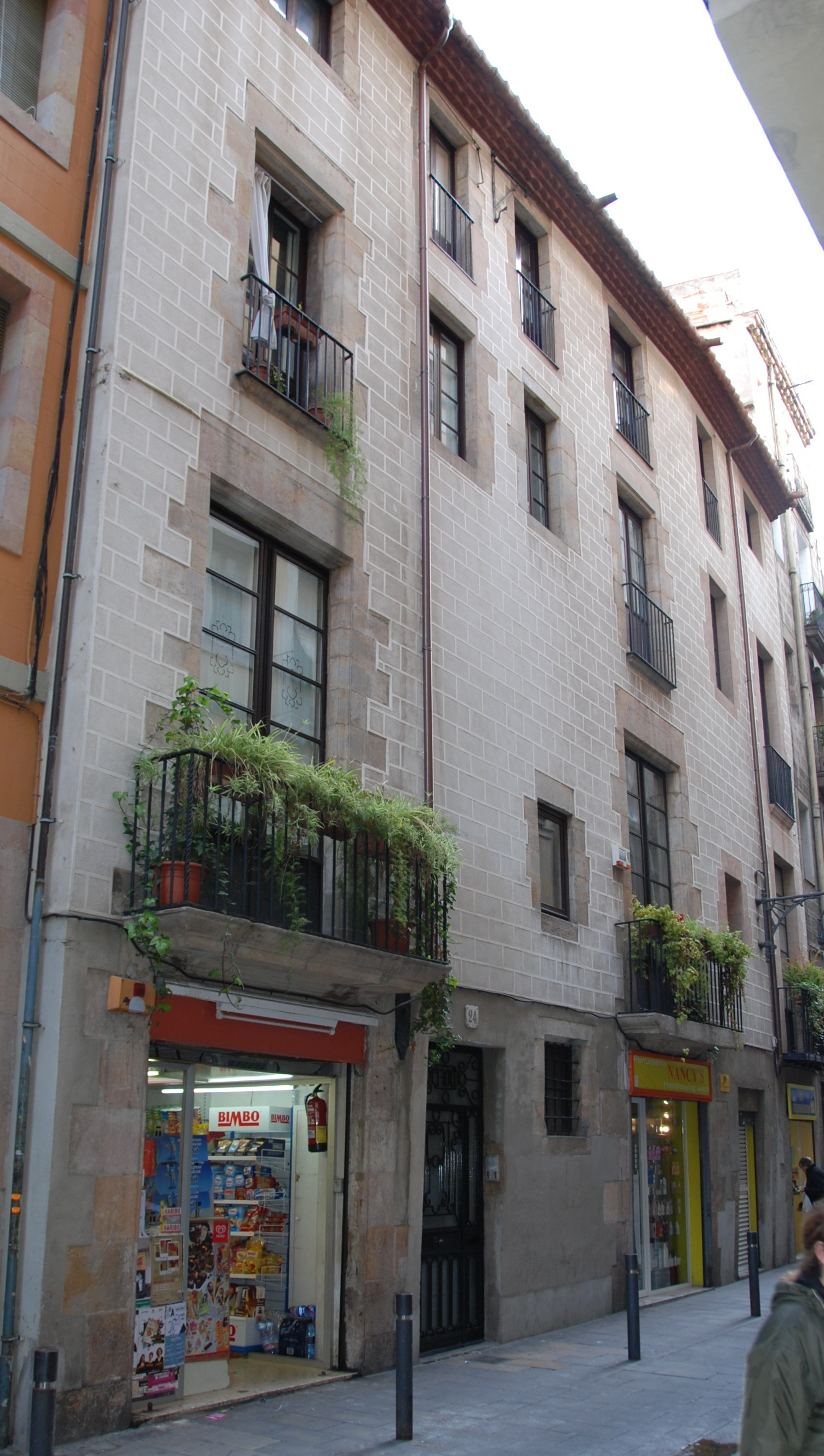 Kamienica w Barcelonie przy Carrer Sant Pere Mes Alt 24